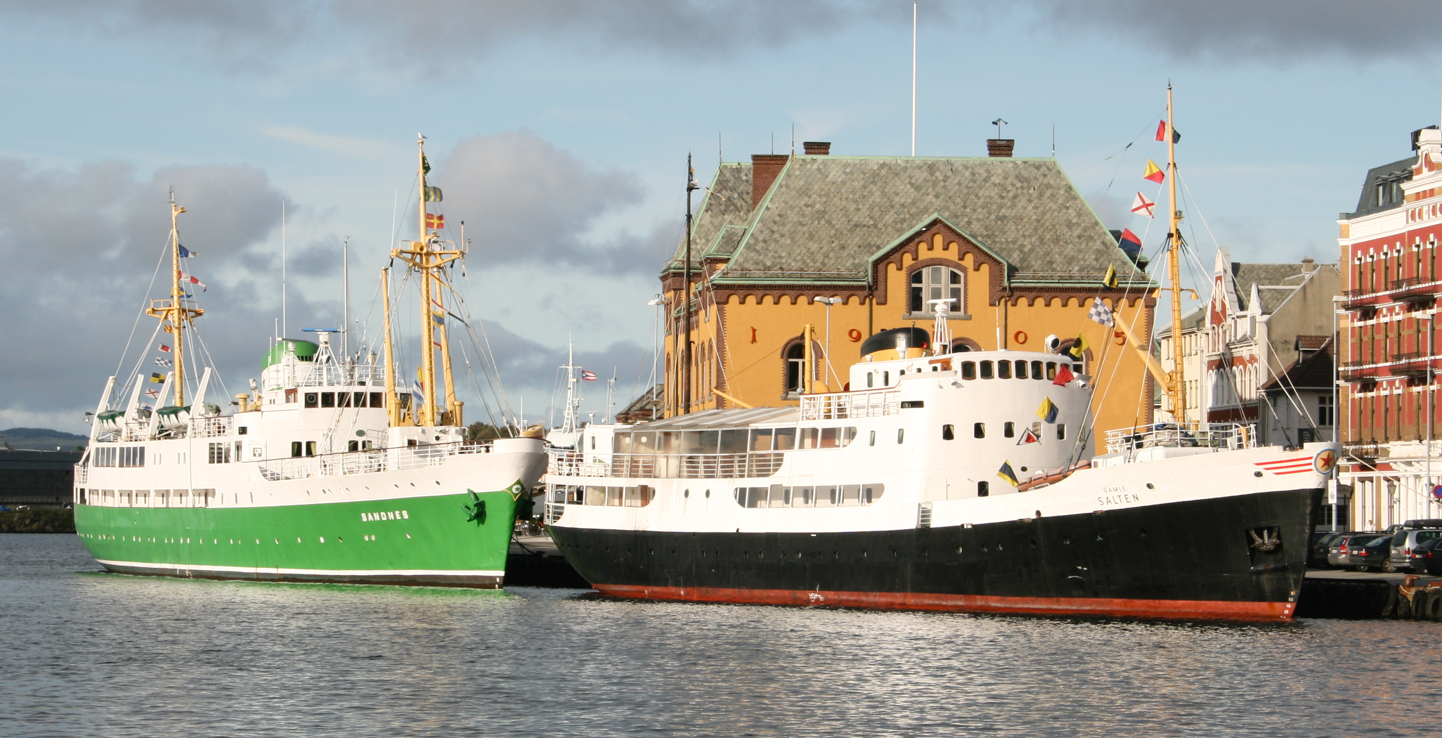 MS Sandnes and MS Gamle Salten (formerly MS Salten) in Stavanger, Norway